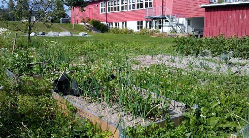 Skolekjøkkenhagen ved Haneborg skole.